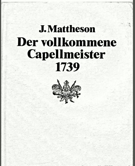 Johann Mattheson, Der vollkommene Capellmeister